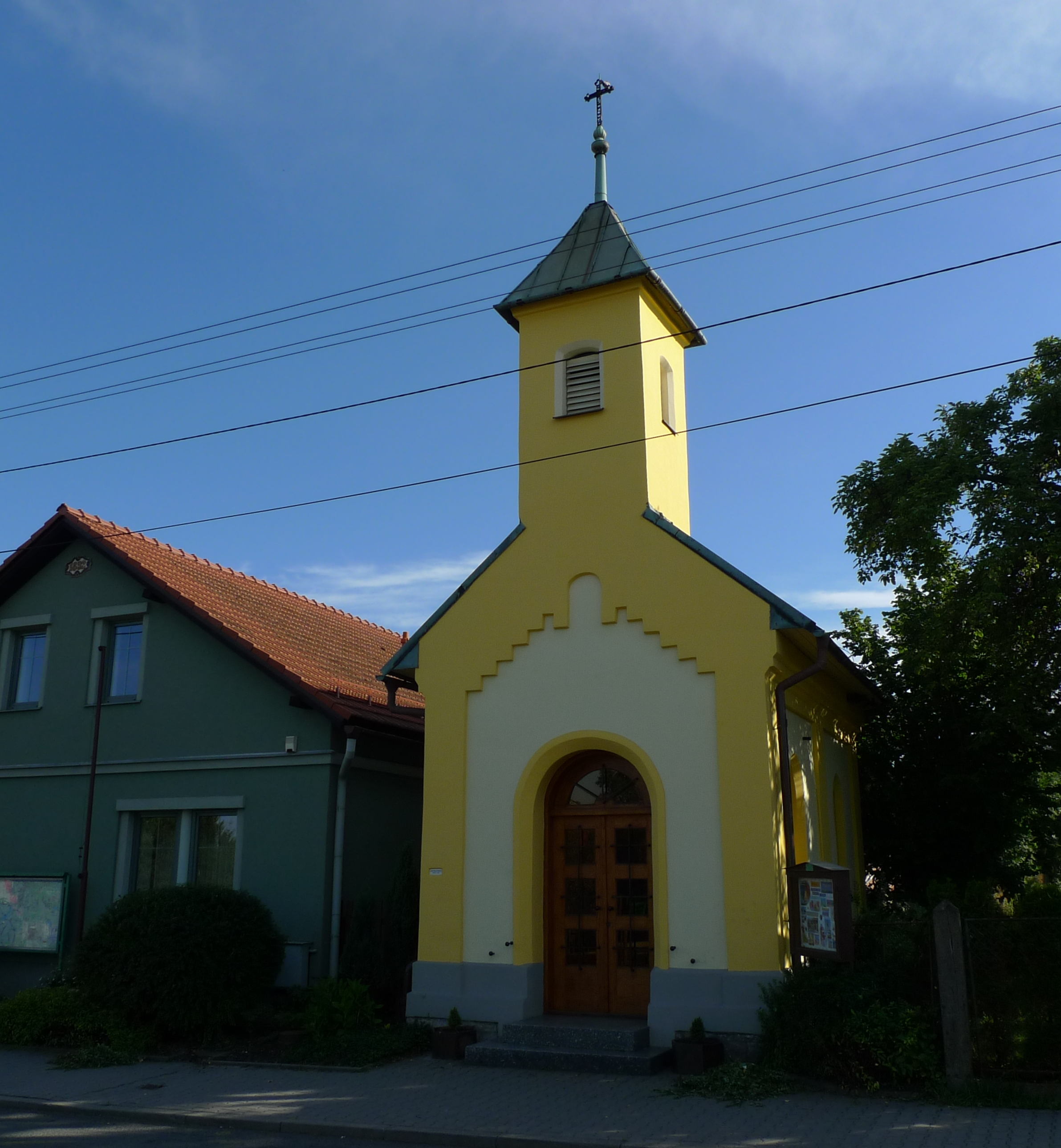 Nová Bělá